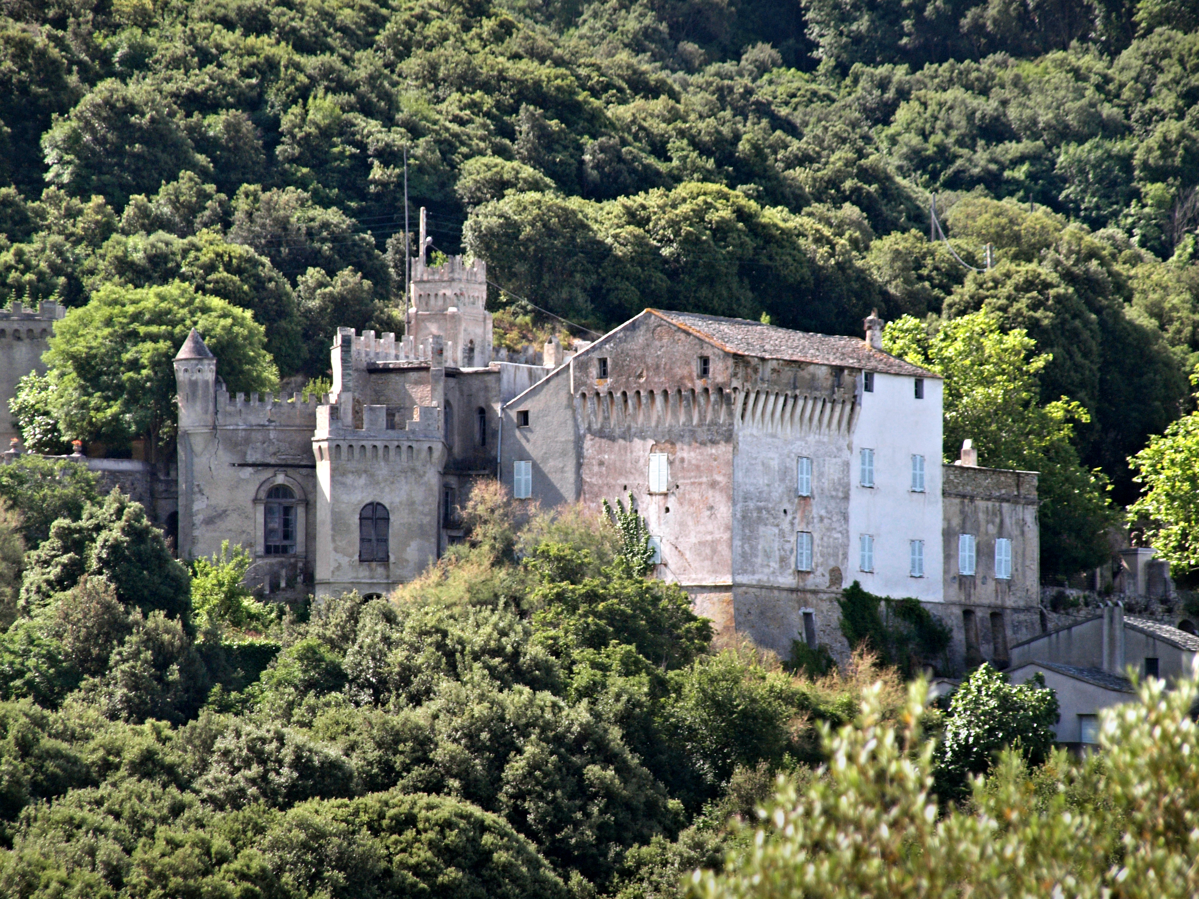 Centuri (Corse) - Vue du château de Merlacce